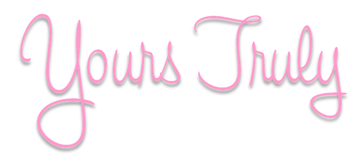 Logotipo del ábum debut de Ariana Grande.